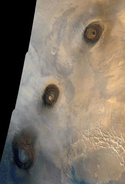 Tharsis Montes, le 22 février 1980. Image reconstituée à partie d'une mozaïque d'images capturées par la sonde Viking I.